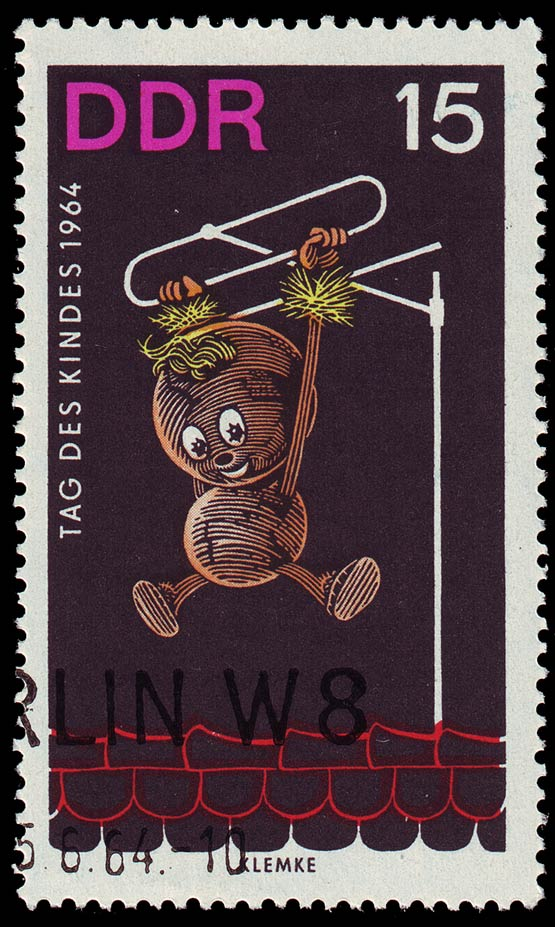 Pittiplatsch, marionnette de la télévision enfantine